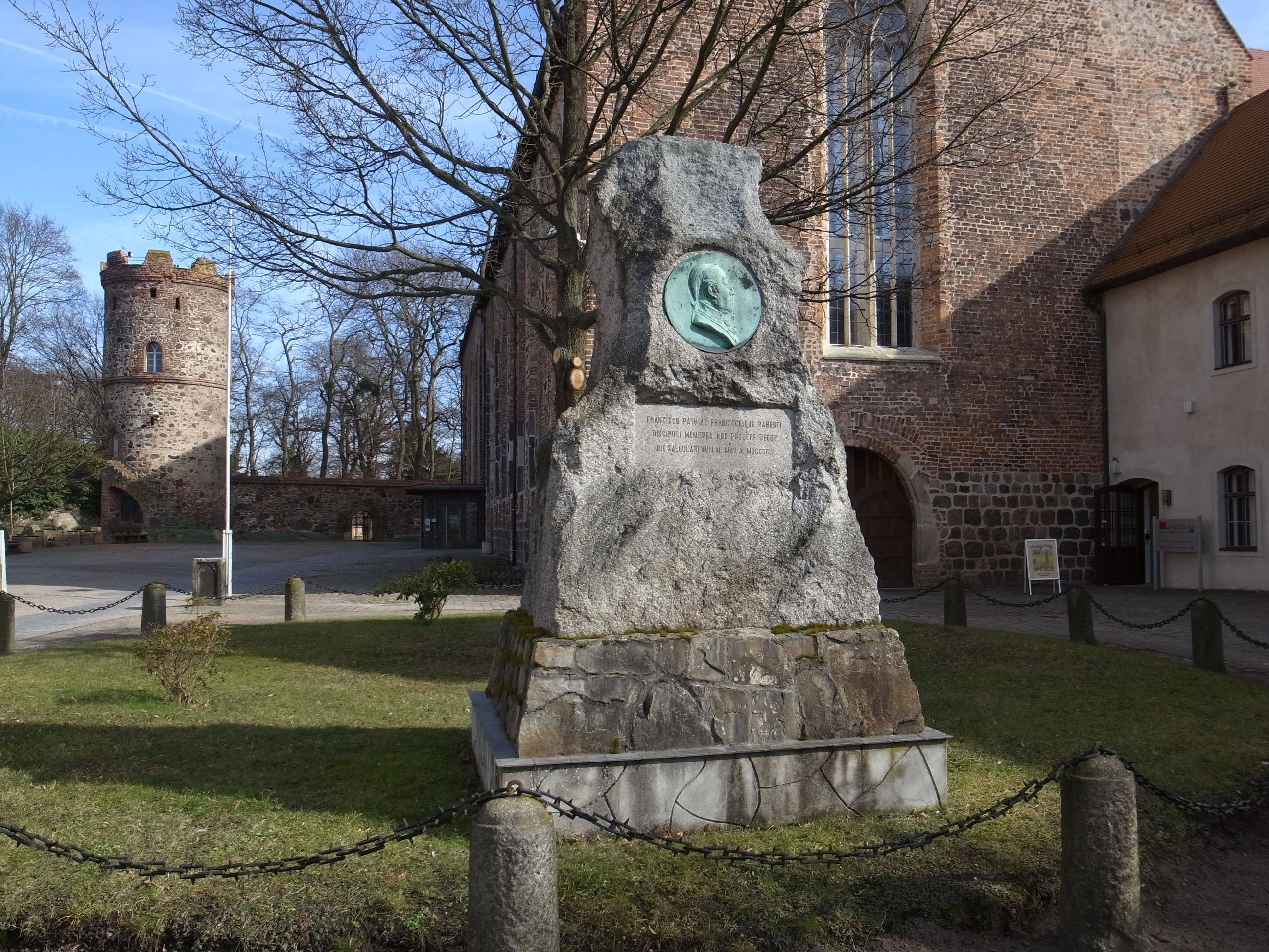 Zerbst (Anhalt). Denkmal für Fürst Leopold III. Friedrich Franz (Anhalt-Dessau).Rechts Eingang zum Museum der Stadt Zerbst/Anhalt.